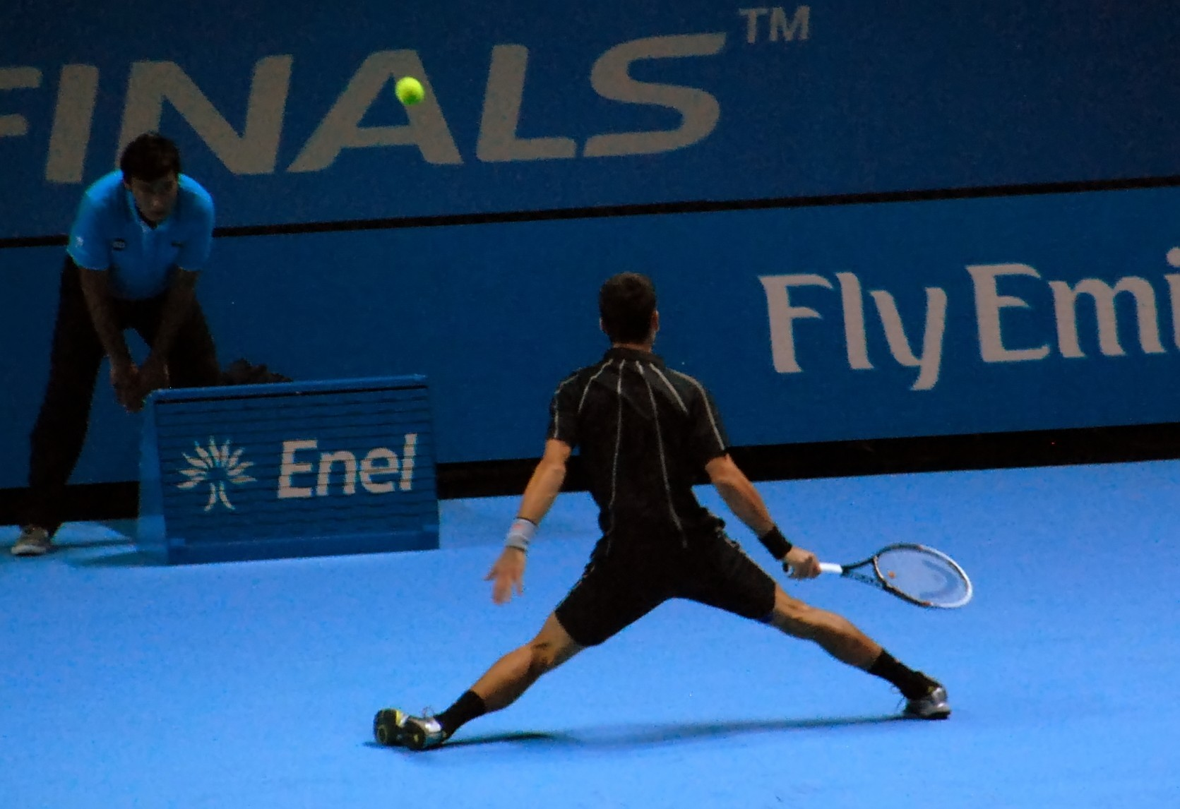 Novak Djokovic